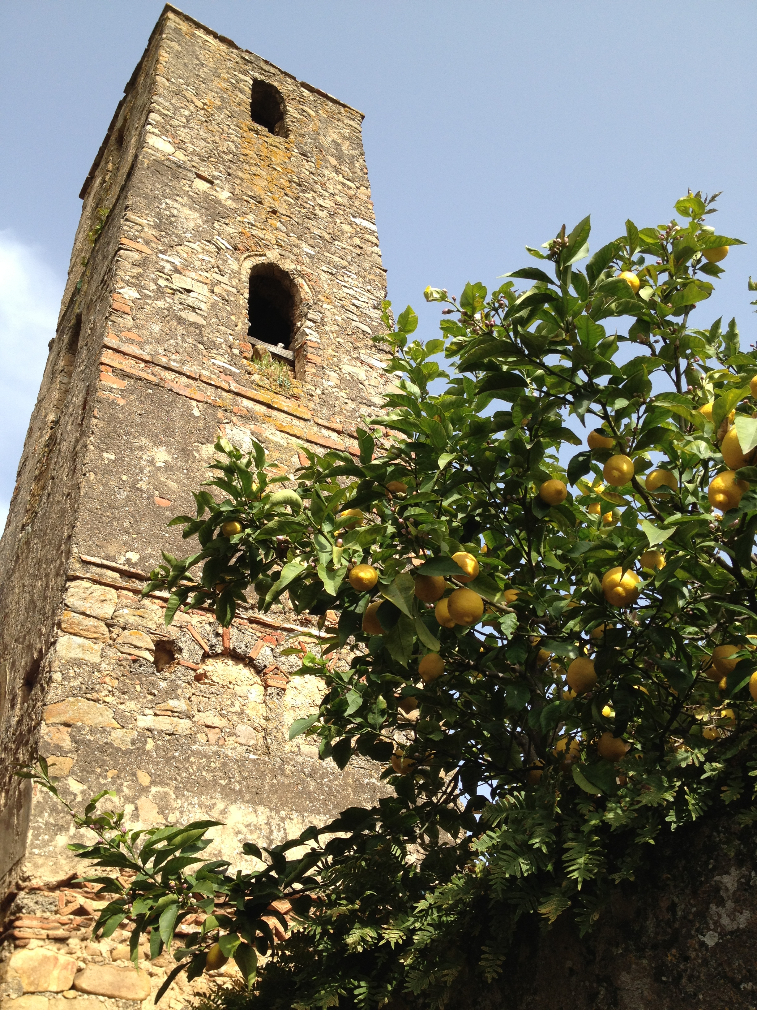 Campanile della Badia di Santa Maria di Pattano (Vallo della Lucania).